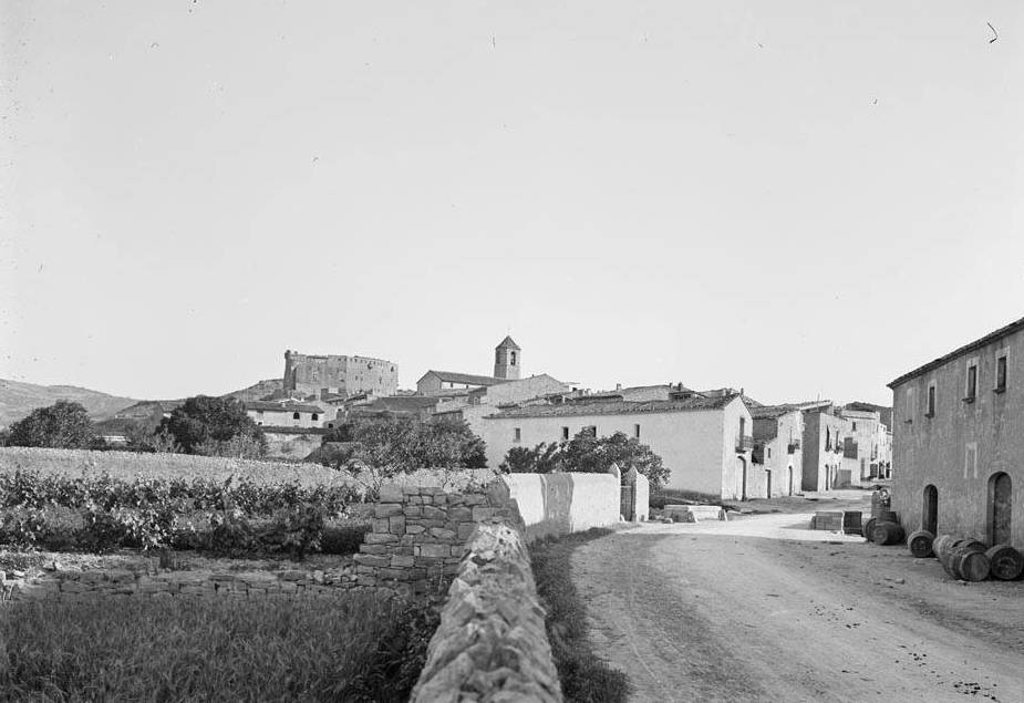 Imatge